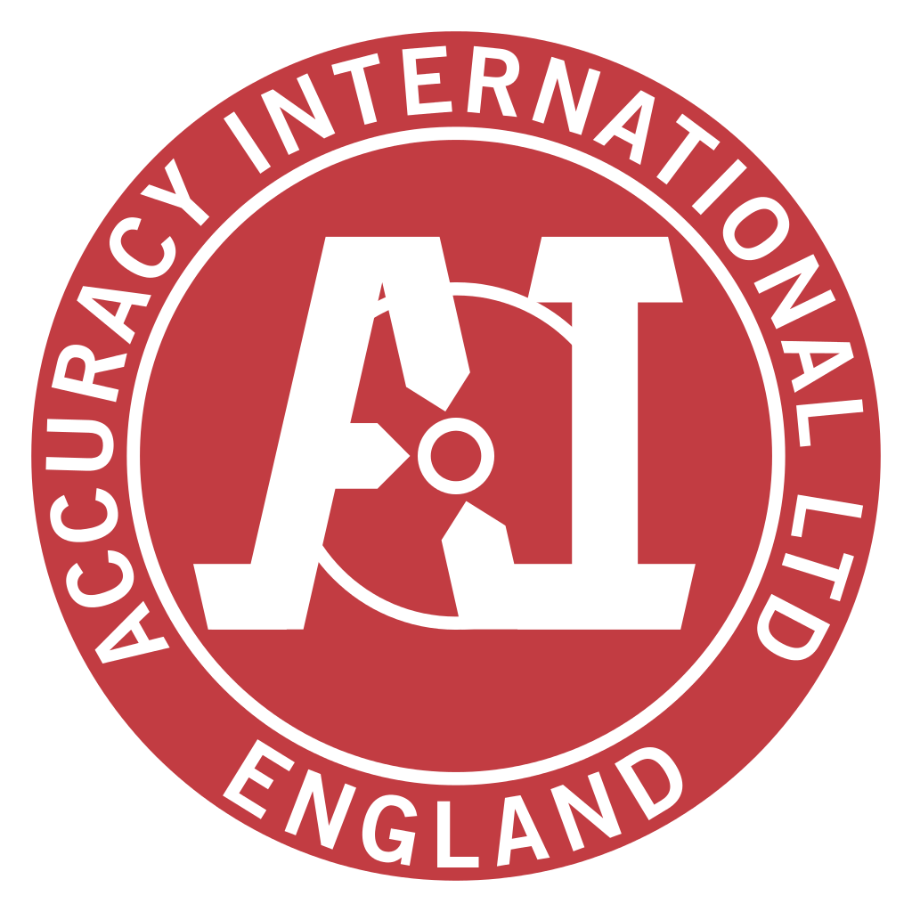 Logo de la compañia Accuracy International